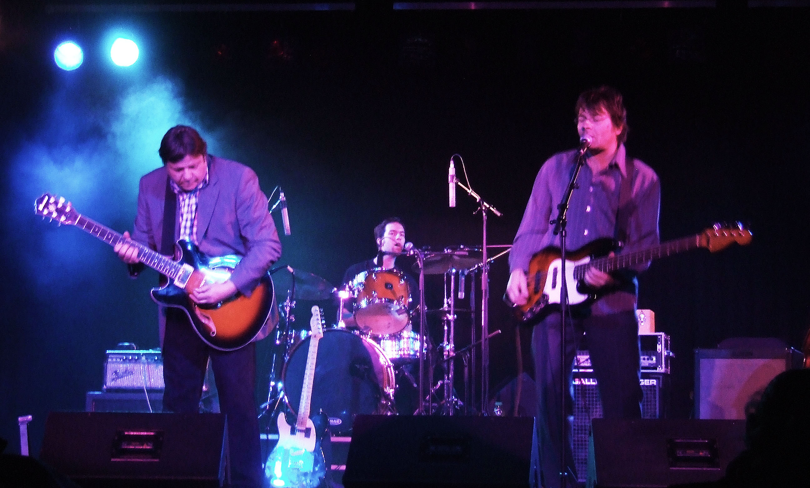 A Kispál és a Borz a szegedi Ifjúsági Házban 2008-ban.